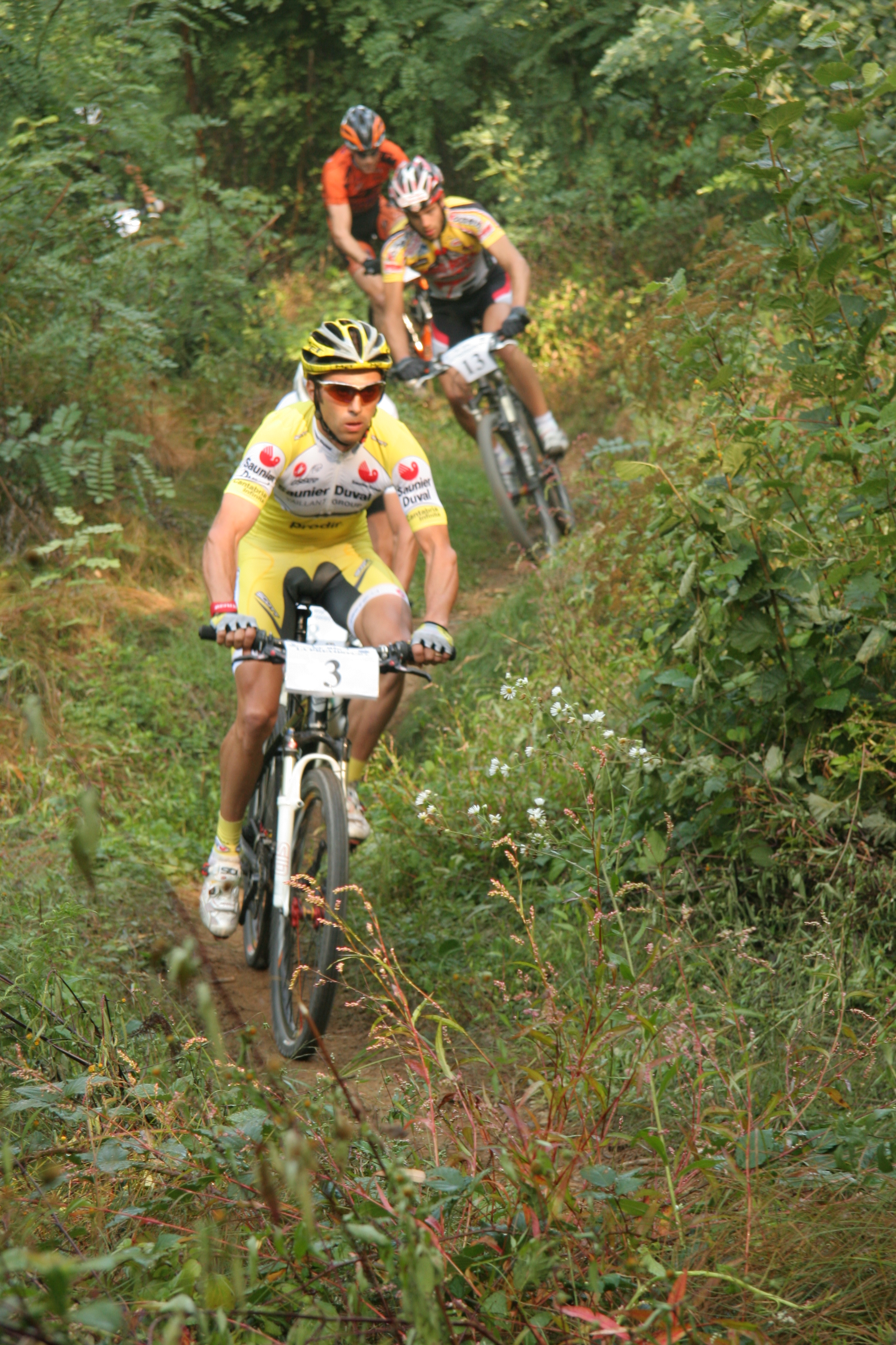 Gilberto Simoni during "La Prevostura 2007" Granfondo competition. Lessona, Piedmont, Italy, 23rd September 2007.